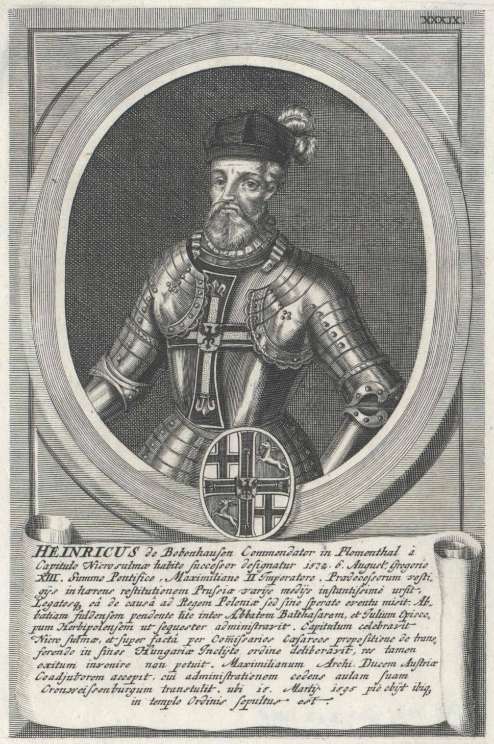 Heinrich von Bobenhausen (1515–1595)